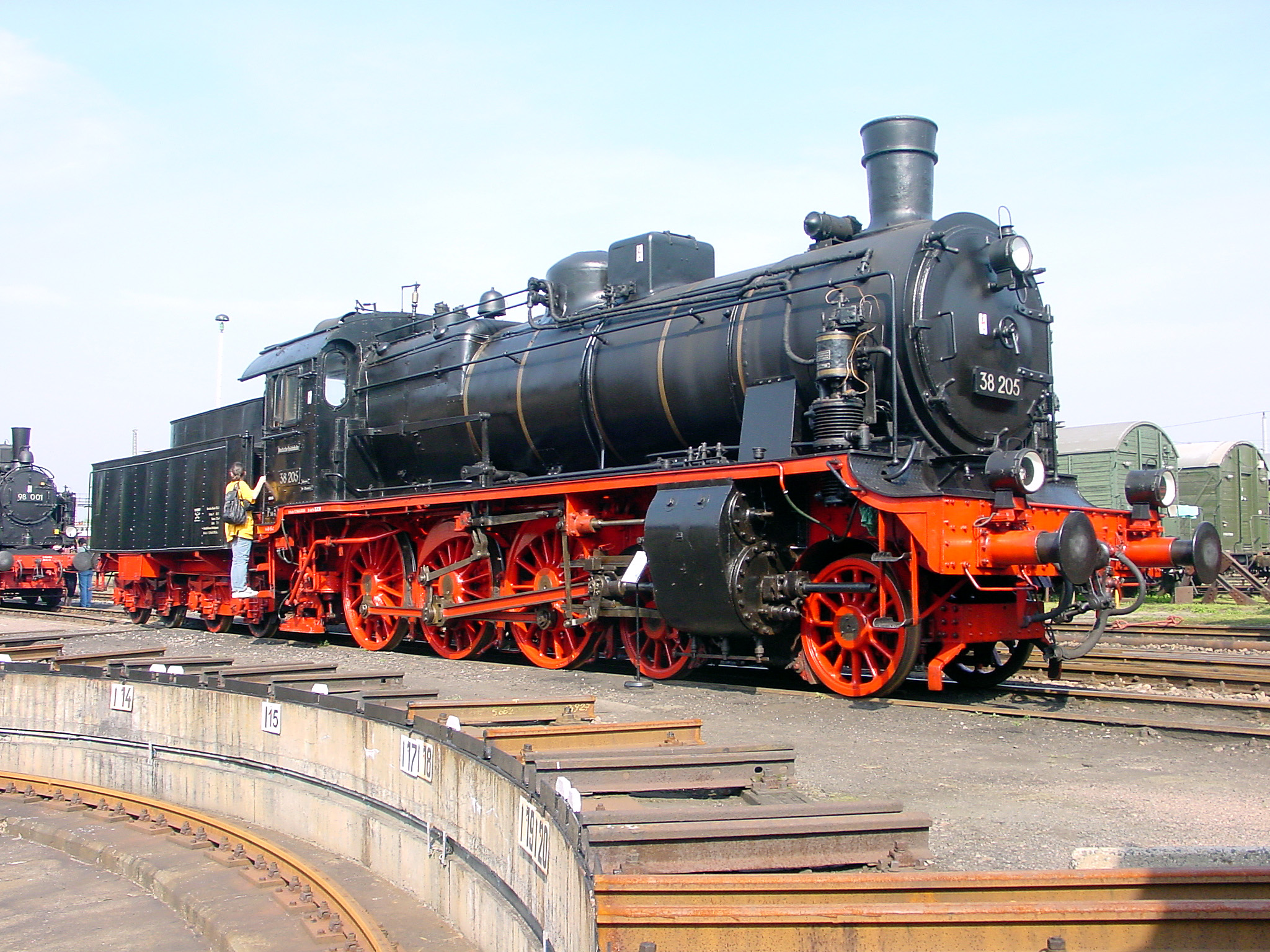 Dampflokomotive Sächsische XII H2 im Eisenbahnmuseum Chemnitz-Hilbersdorf.